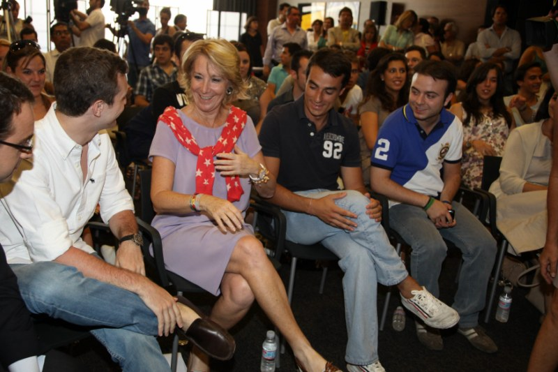 Esperanza Aguirre (mujer con pañuelo rojo) y Ángel Carromero (chico con camiseta con número 2 en el brazo)